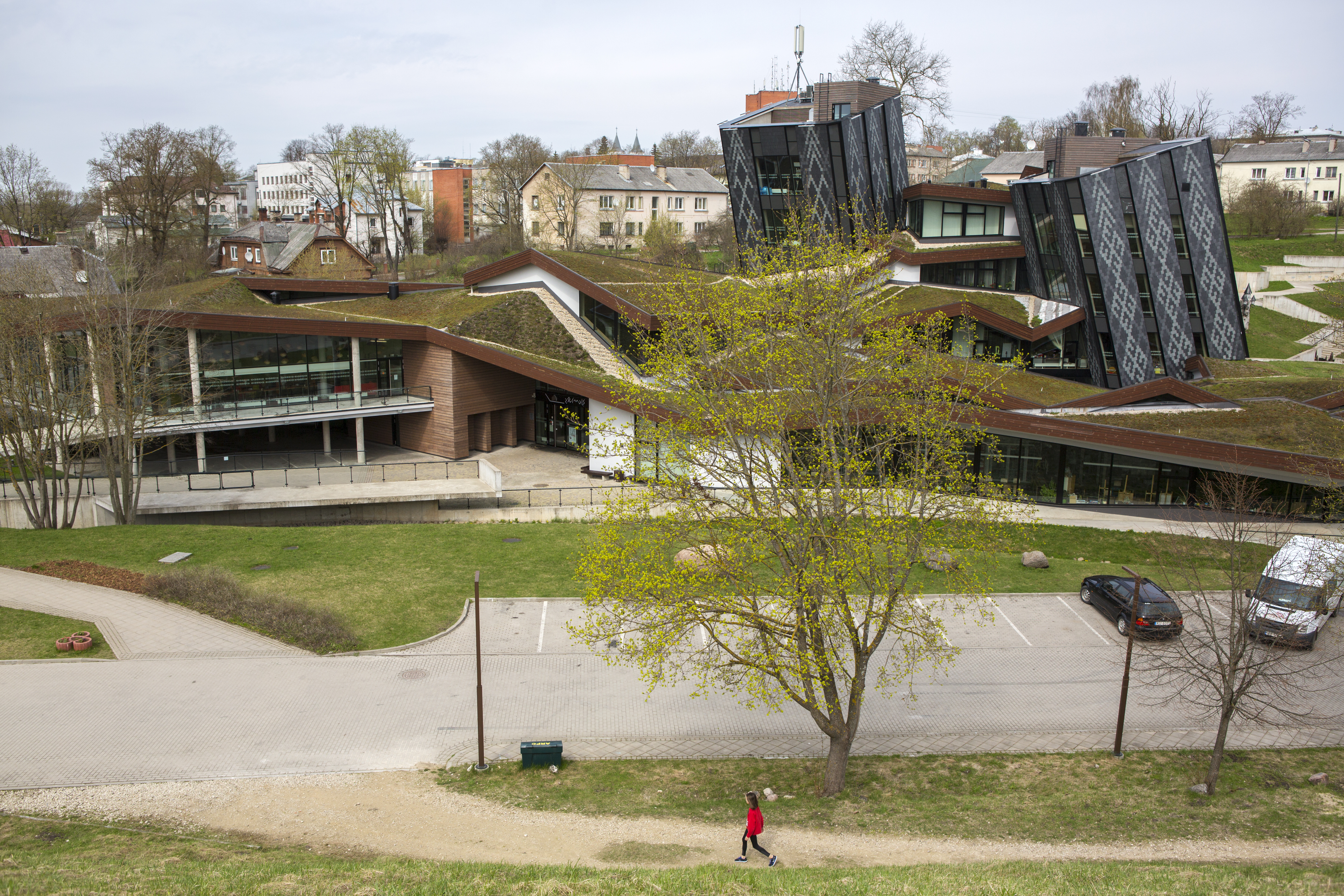 Резекне, Латвия